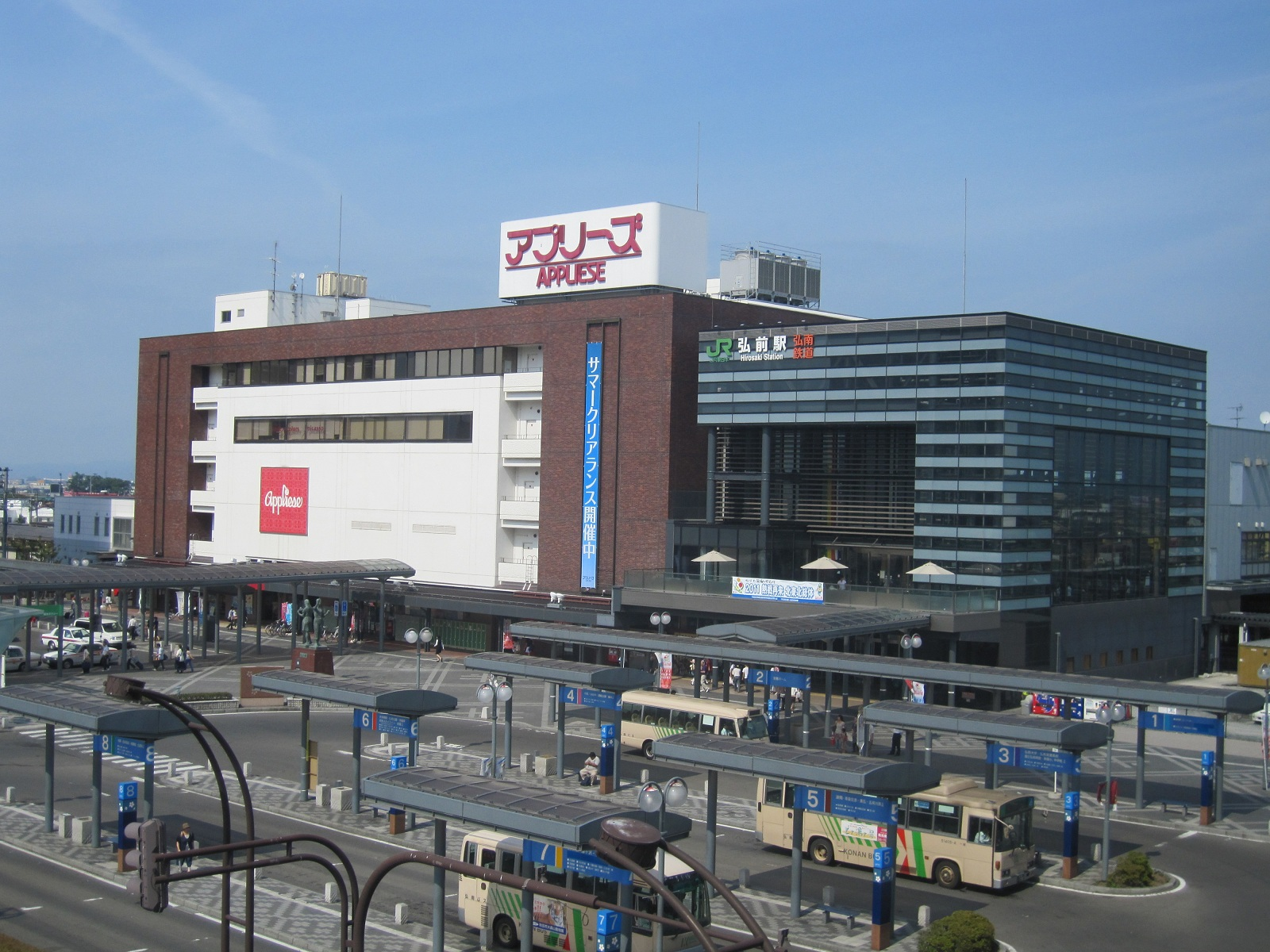 弘前駅全景